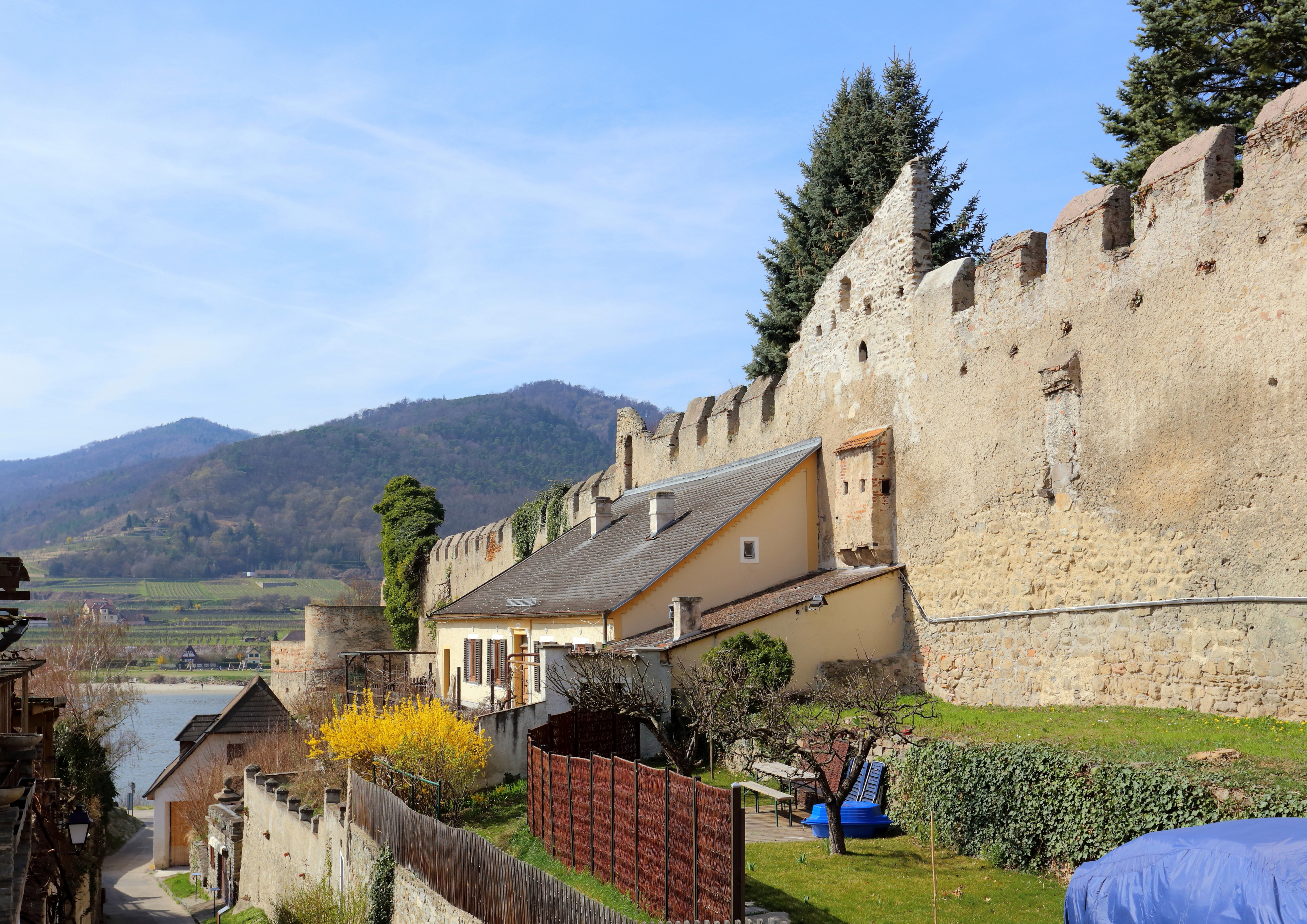 Südlicher Teilabschnitt der Stadtmauer in Dürnstein.